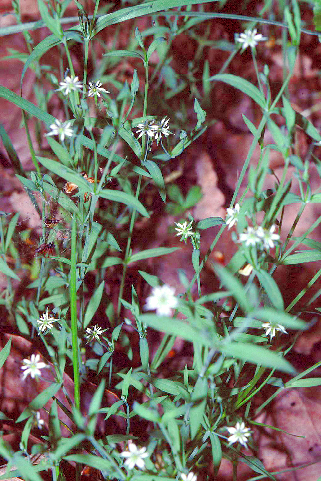 Stellaria alsine, eigenes Foto von 1986, Unterfranken, Benutzer:Fornax, Lizenz: Bild-PD